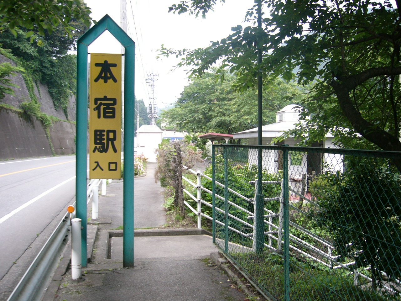 Motojuku Station